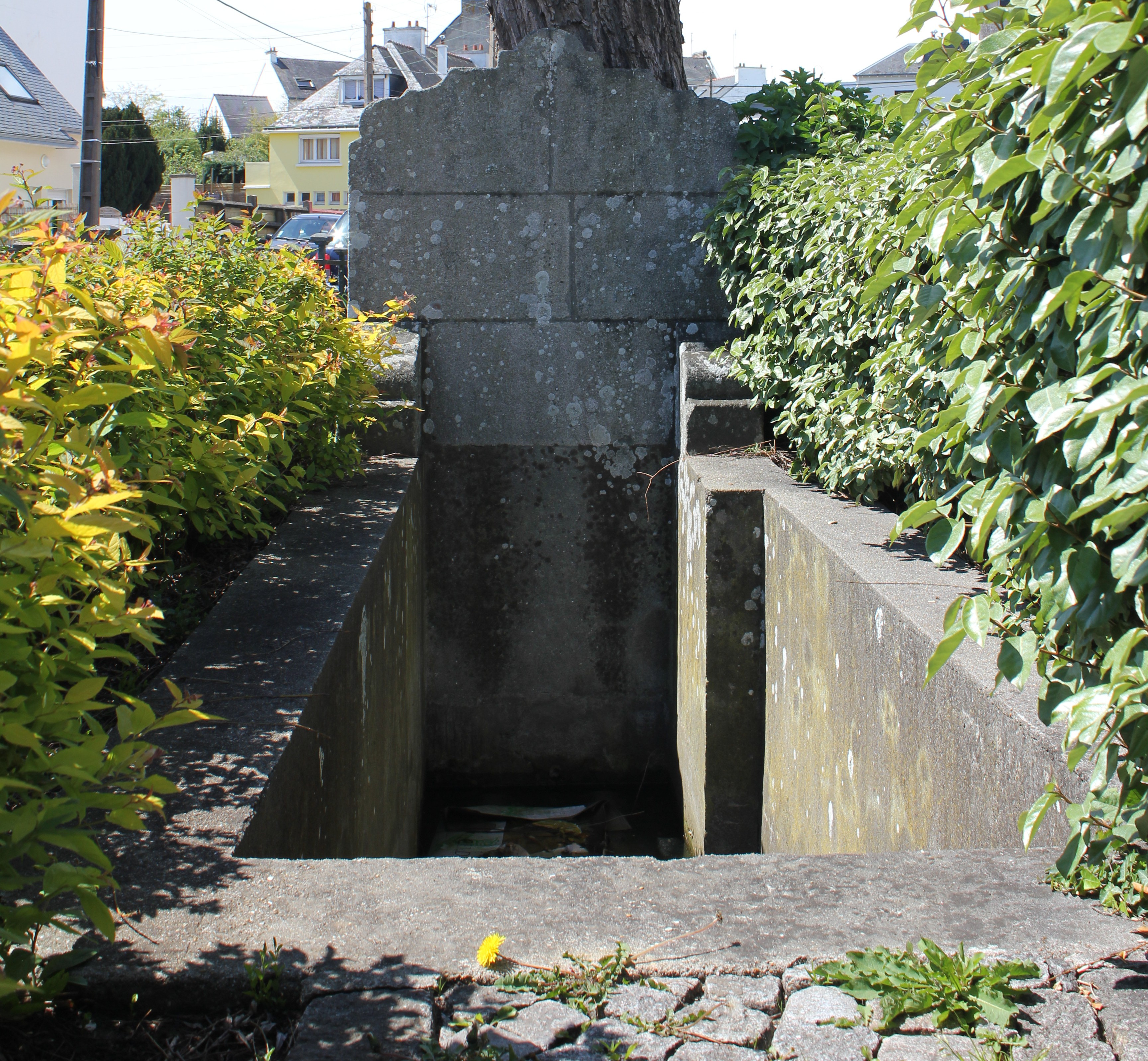 Fontaine dites des anglais, à Lorient, France. Utilisée lors du siège de Lorient par des troupes anglaise.